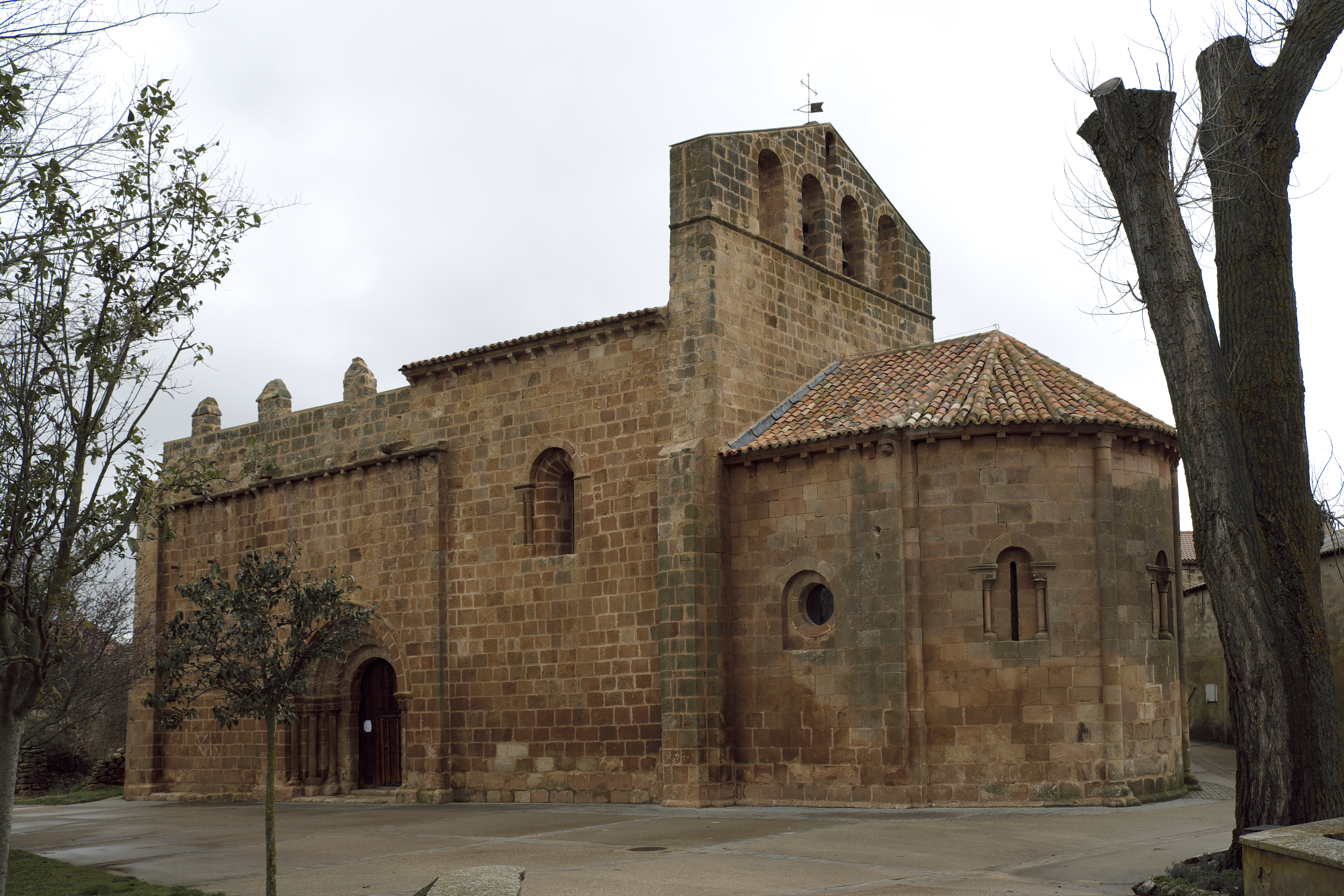 Kirche Nuestra Señora de los Ángeles in Fuensaúco, einem Ortsteil von Renieblas in der Provinz Soria (Kastilien-León/Spanien), Ansicht von Südosten